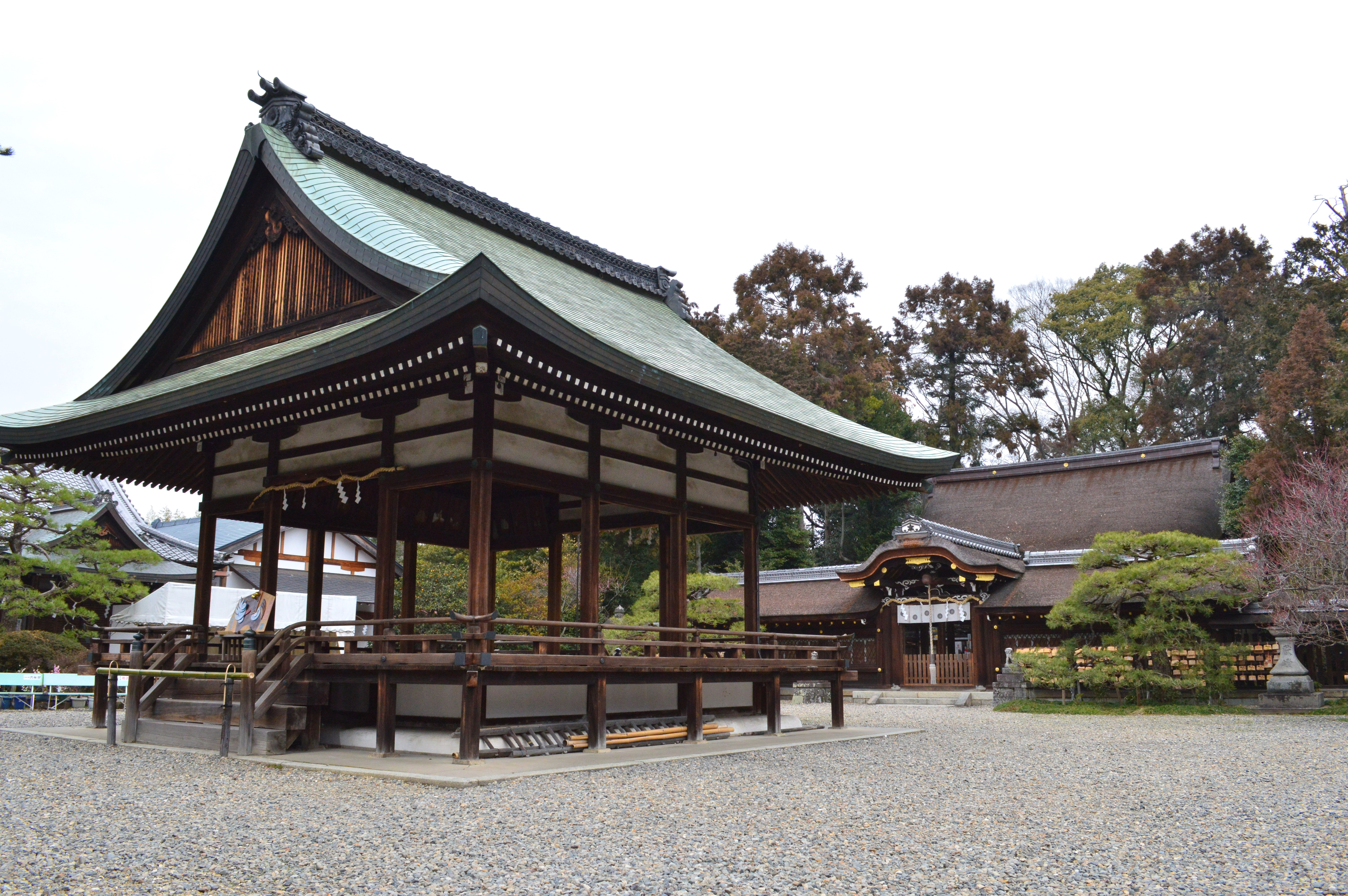 梅宮大社 社殿